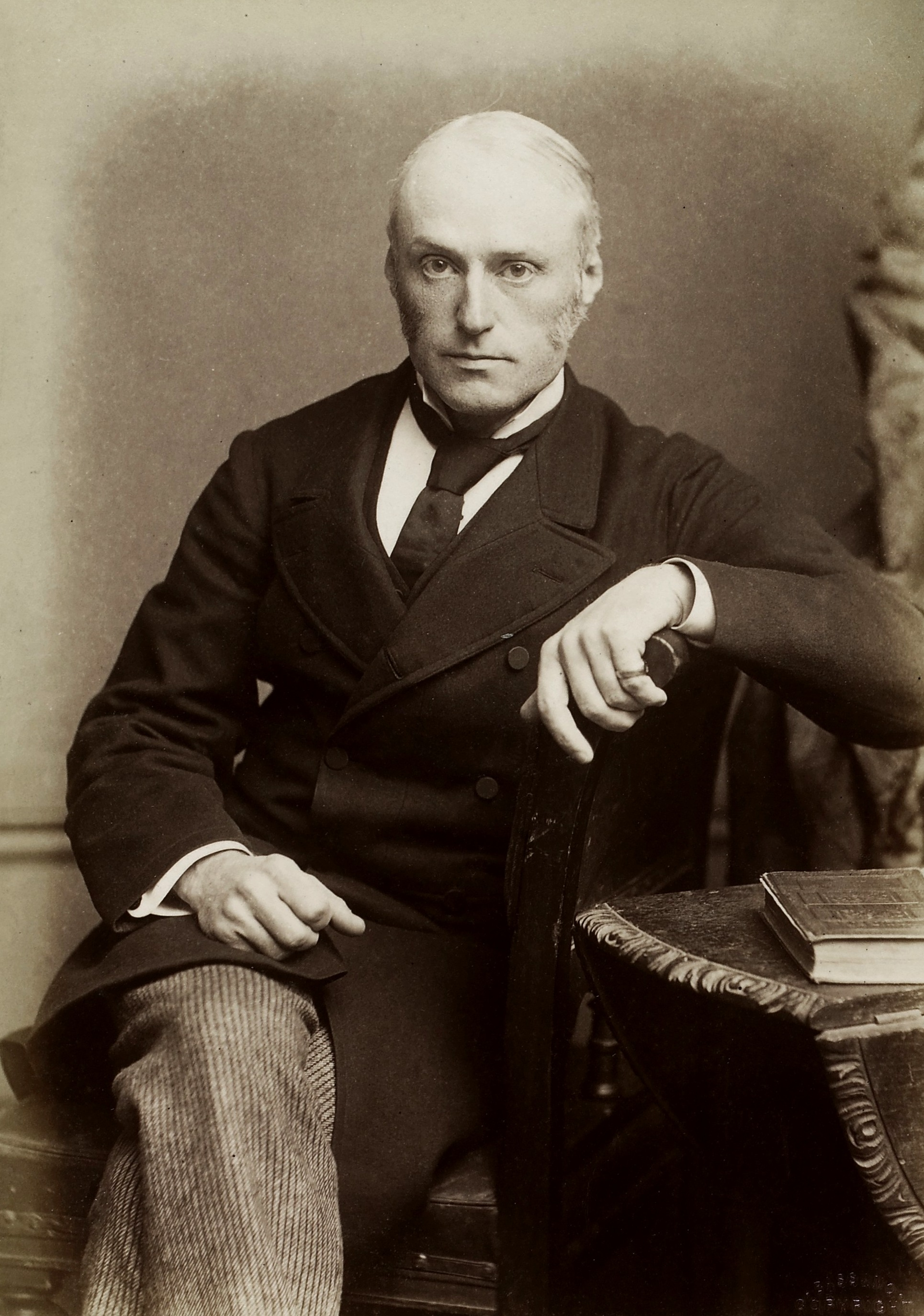 Sir Richard Powell, 1st Baronet